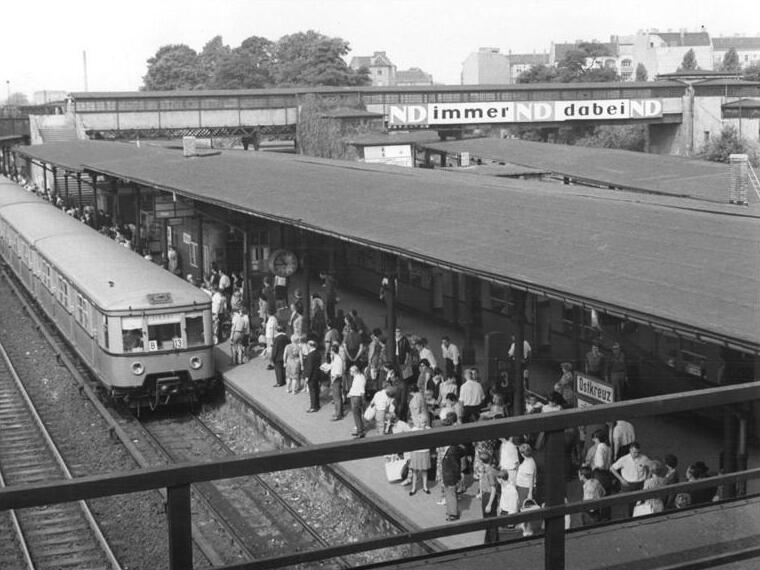 Zentralbild-Reiche Ho 29.7.1967 Berlin: S-Bahnhof Ostkreuz - Mit der S-Bahn ... fahren an diesem heißen arbeitsfreien Sonnabend viele Berliner und Berlinerinnen ins Grüne.